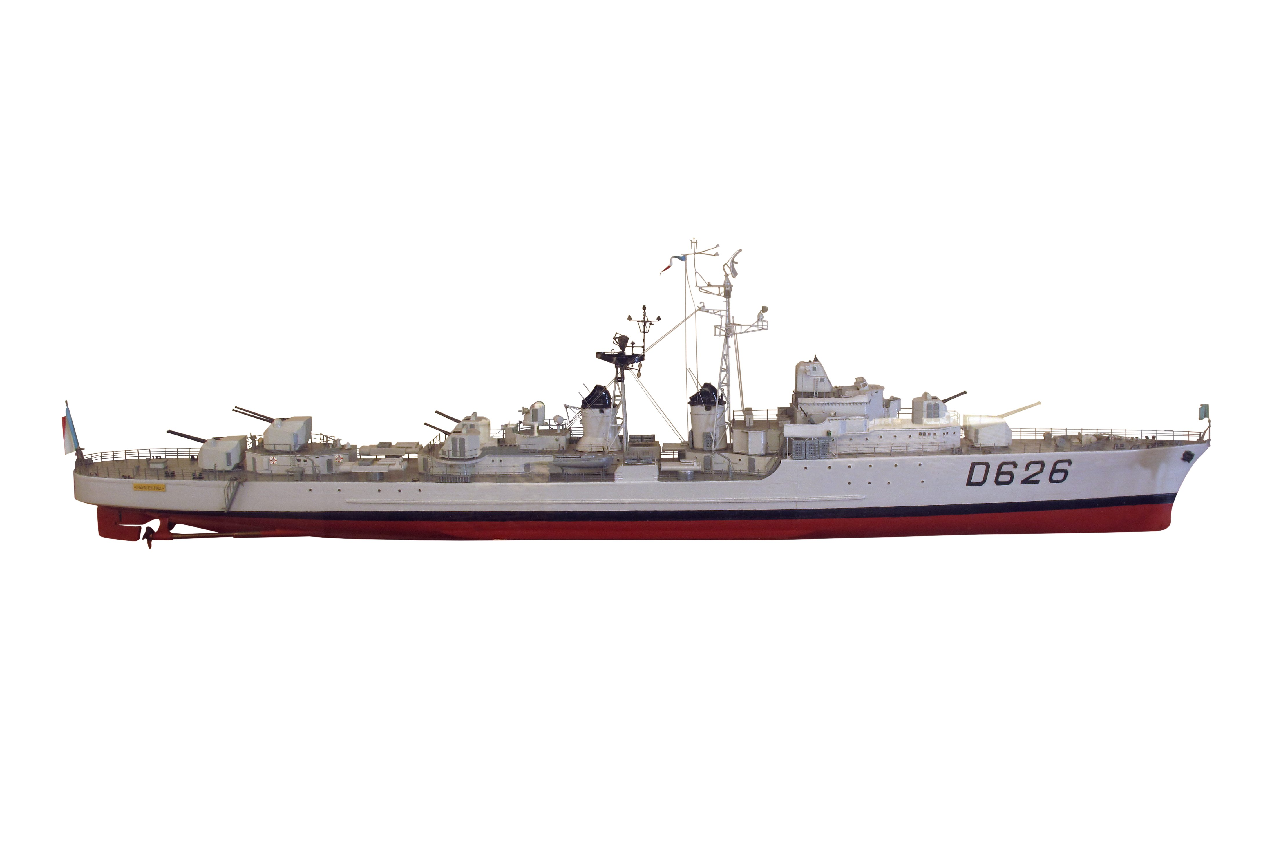 Model of the T 47 class destroyer Chevalier Paul (D626). On display at the Musée de la Marine et de l'Economie de Marseille.